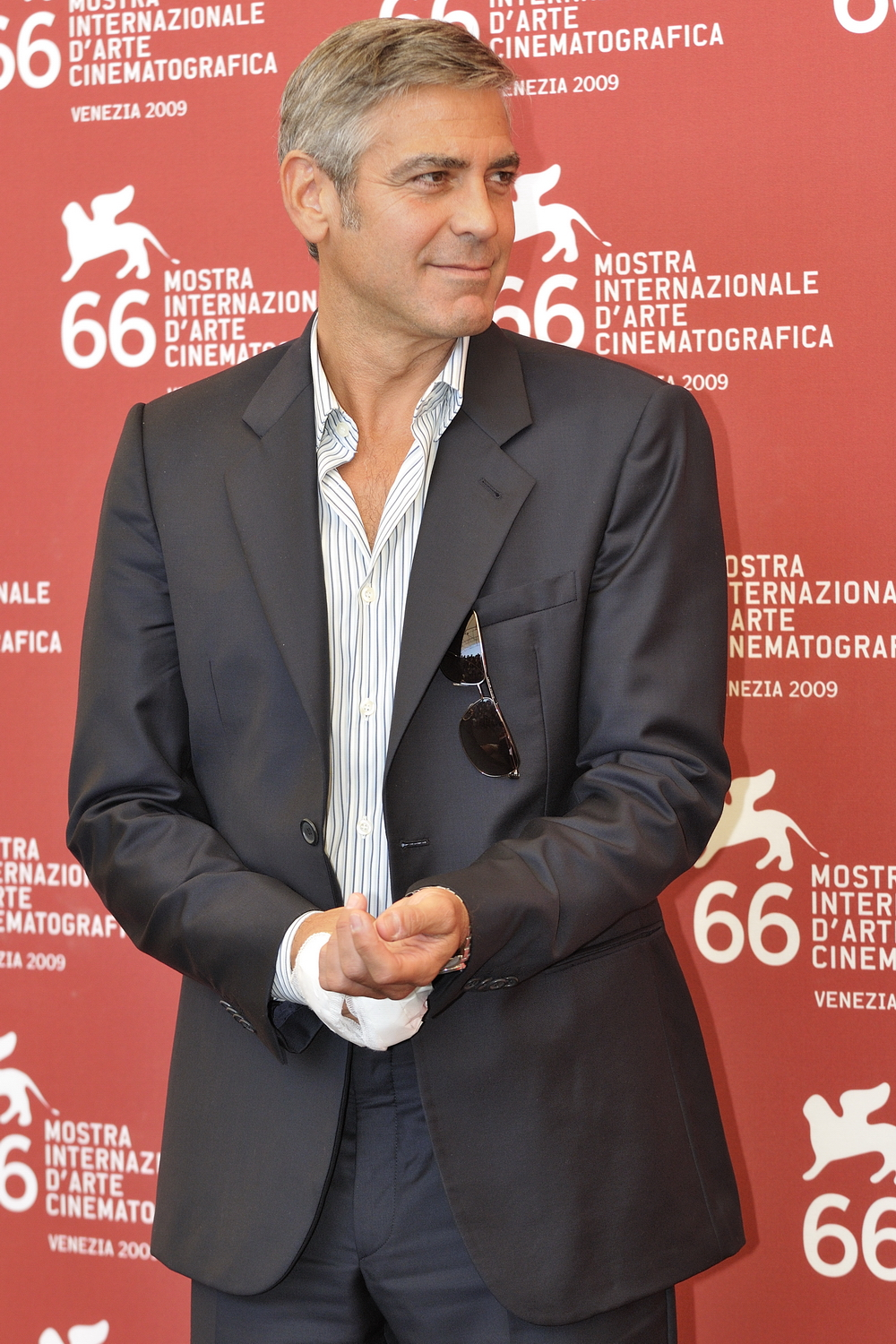 66ème Festival du Cinéma de Venise (Mostra), 6ème jour (07/09/2009) Photocall avec George Clooney et Elisabetta Canalis, Ewan McGregor et le réalisateur Grant Heslov pour le film : The men who stare at goats